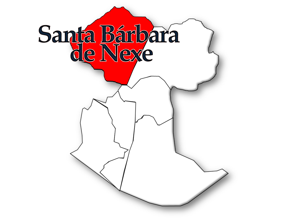 Censos 1864/2011